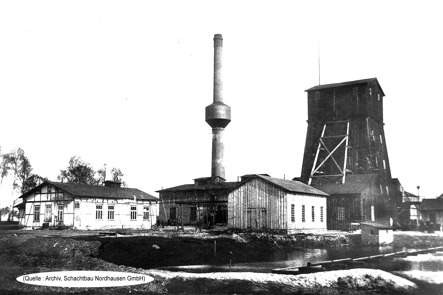 Abteufschacht Conow